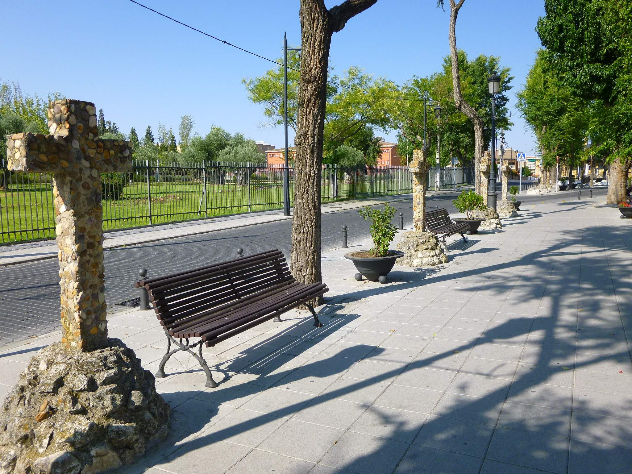 Vía Crucis forma parte del Monumento al Calvario pues estas cruces hacen su recorrido desde la ermita hasta mas alla del monumento, ubicado en el antiguo camino de humanejos, actual calle Bartolome Hurtado en (Parla)